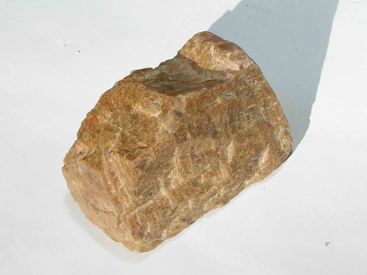 Feldespato